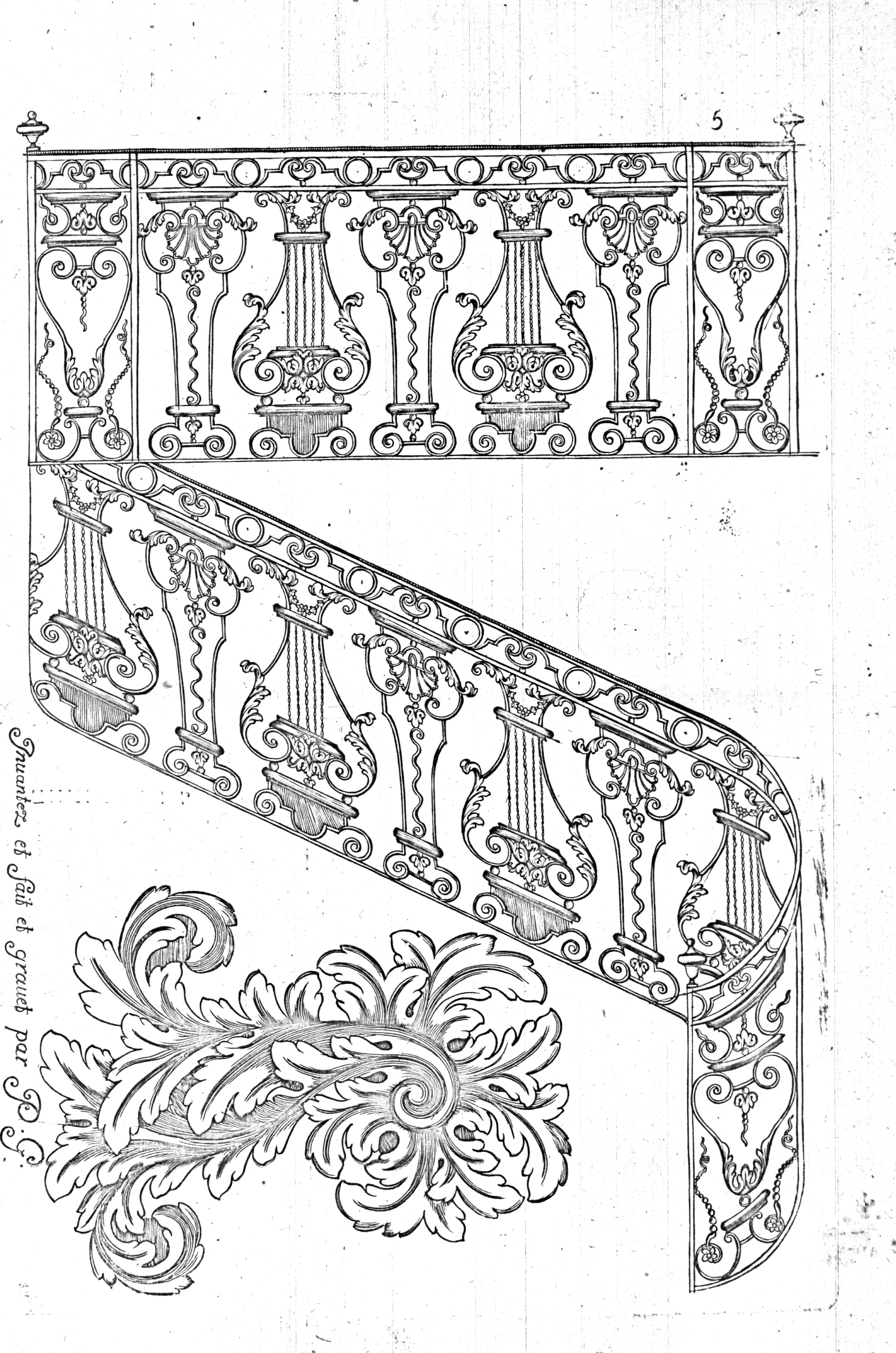 Divers ouvrages de serrurerie... Genève 1713, p. 5